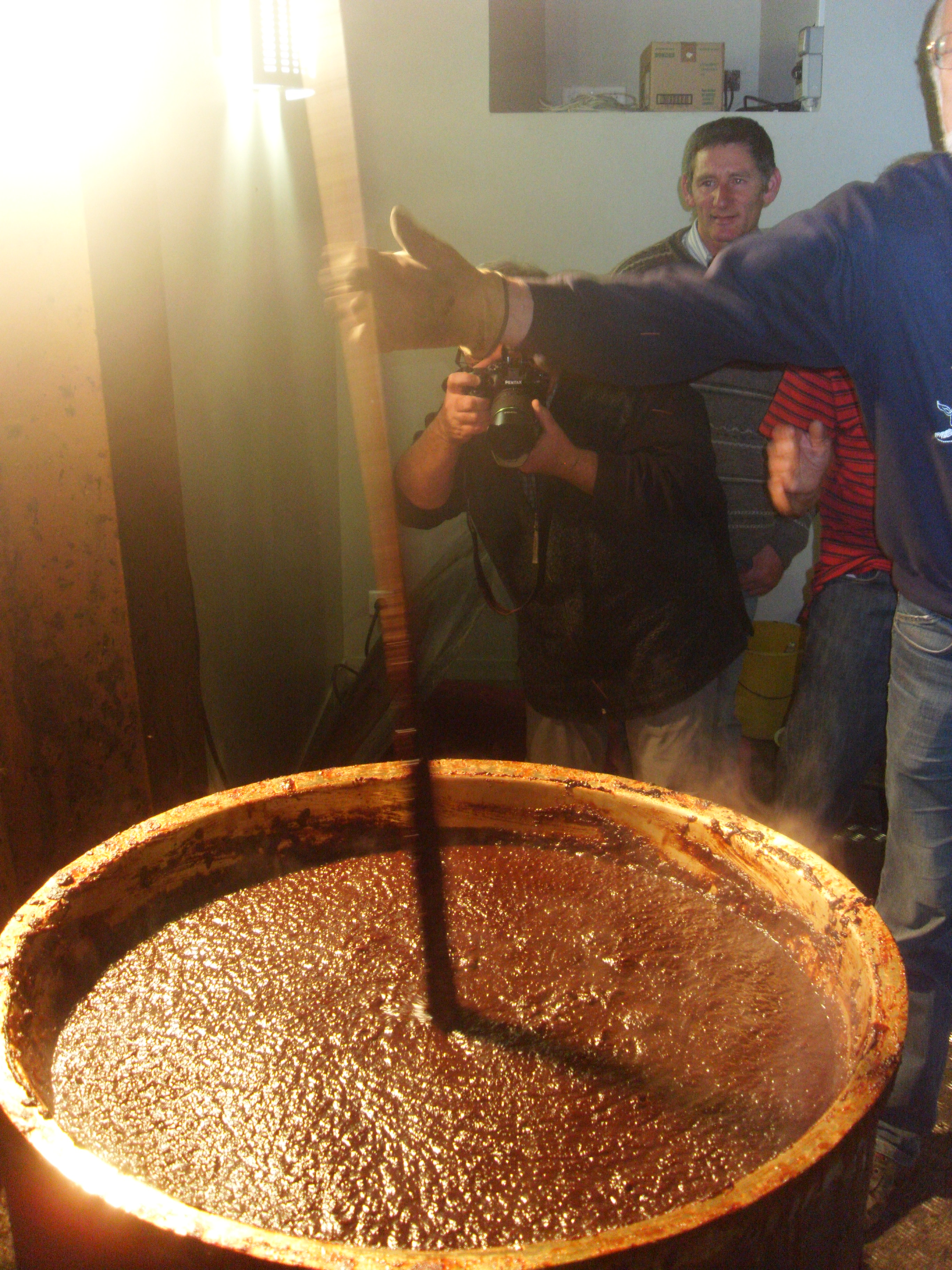 Le ribot marque la fin de la cuisson